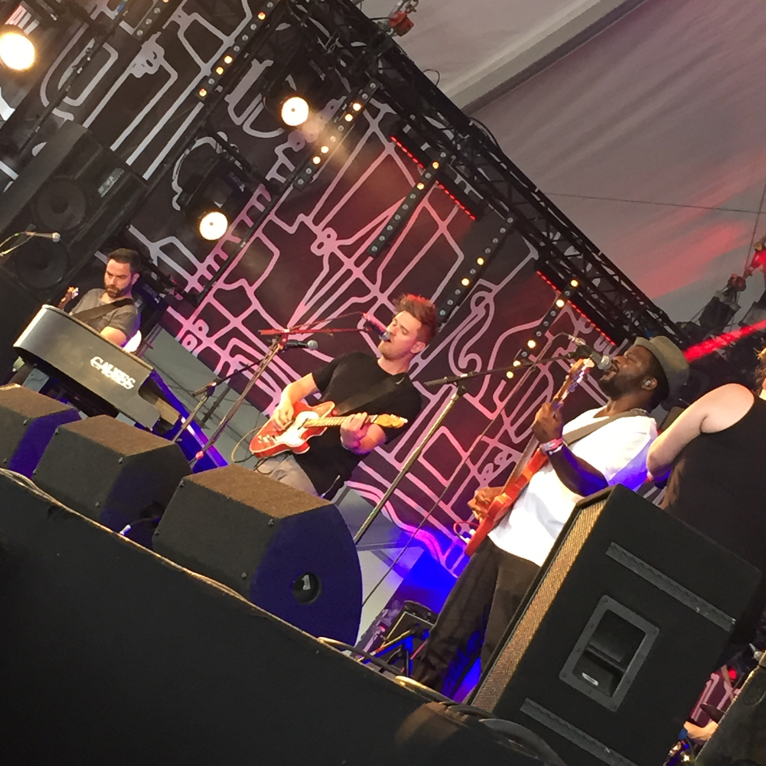 Causes tijdens Pinkpop 2015